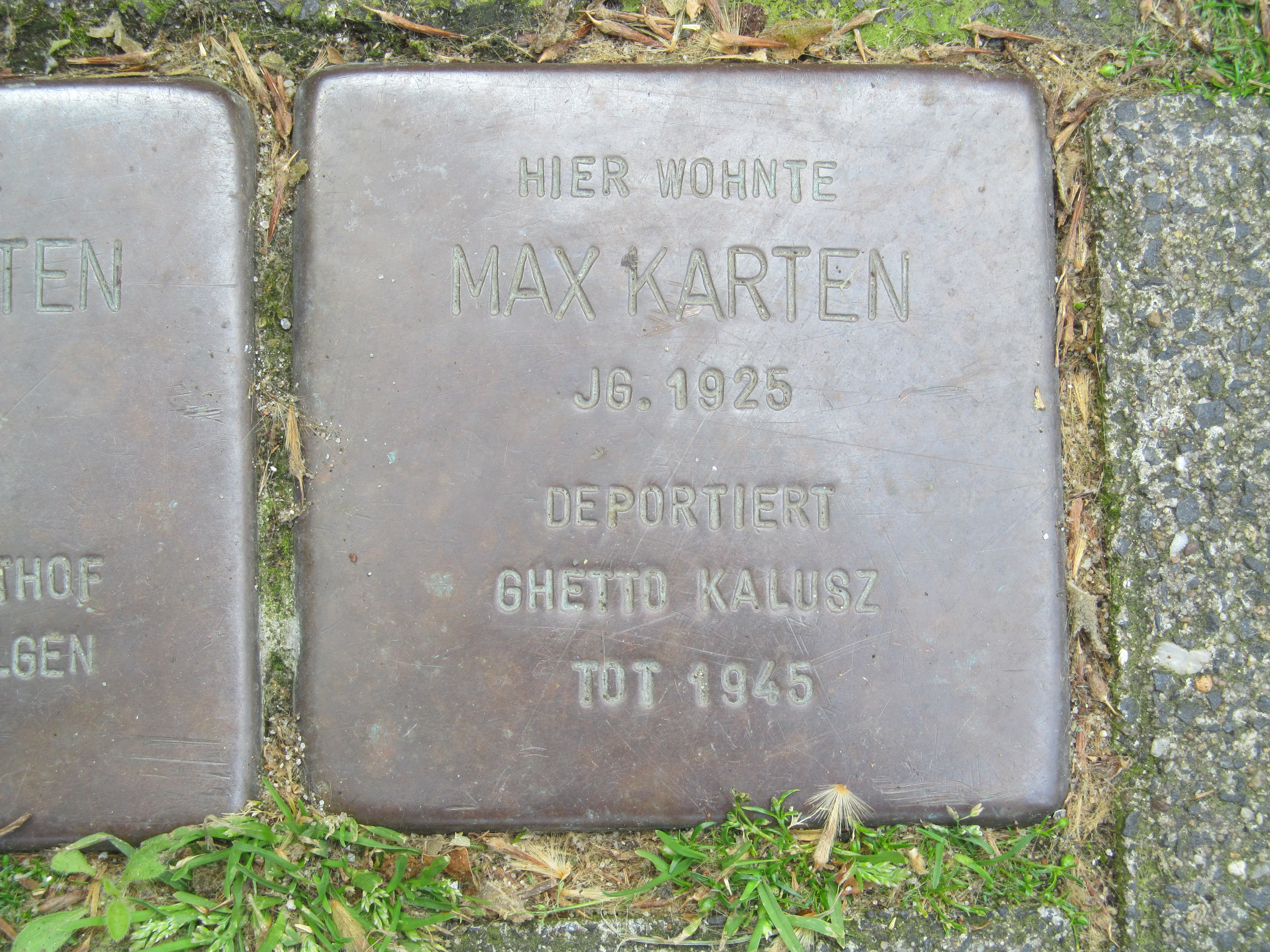 der Stolperstein für Fanny Karten vor dem Haus Rheinstraße 27 in Duisburg-Homberg